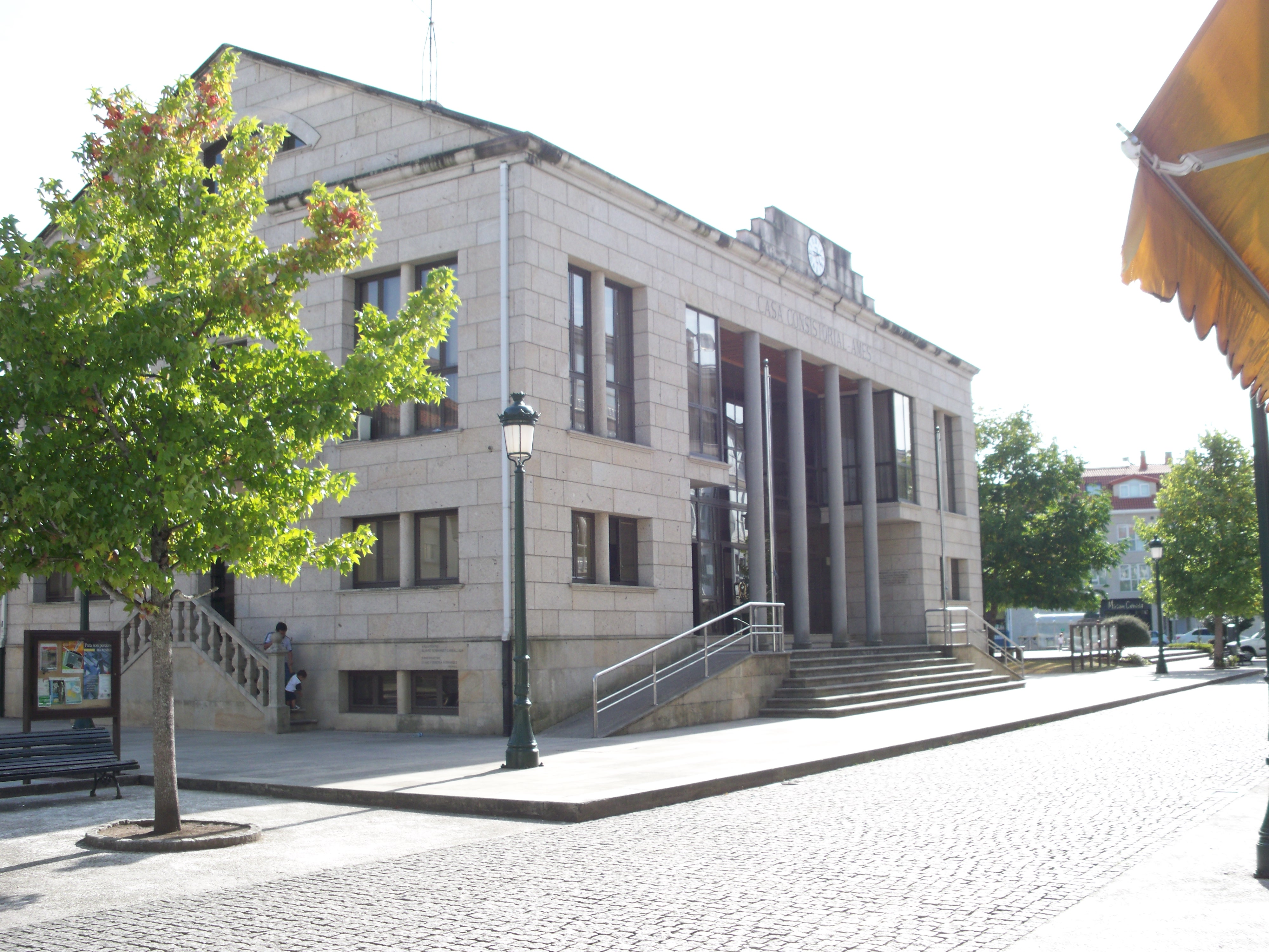 casa consistorial del municipio coruñes de Ames